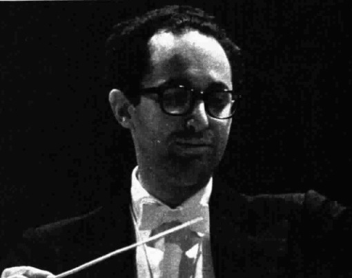 Italian conductor Claudio Scimone directs "I solisti veneti" for a RAI concert